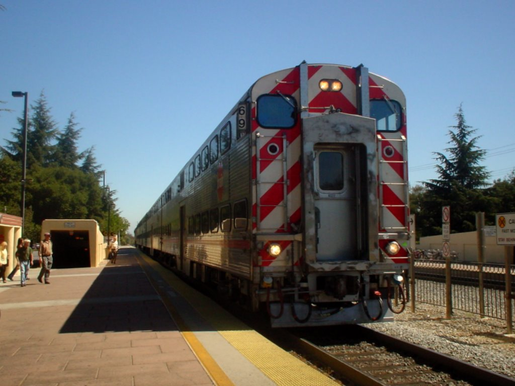 CaltrainはSF（サンフランシスコ市内）とSan Jose（サンノゼ）を結ぶ列車です。外装も内装もゴツくて、アメリカンだなーと思っていると、社内に日本の重工メーカー（名前を忘れてしまいました）のプレートがかかっていました。日本でこんな車両を作ってるとは意外だなぁ。